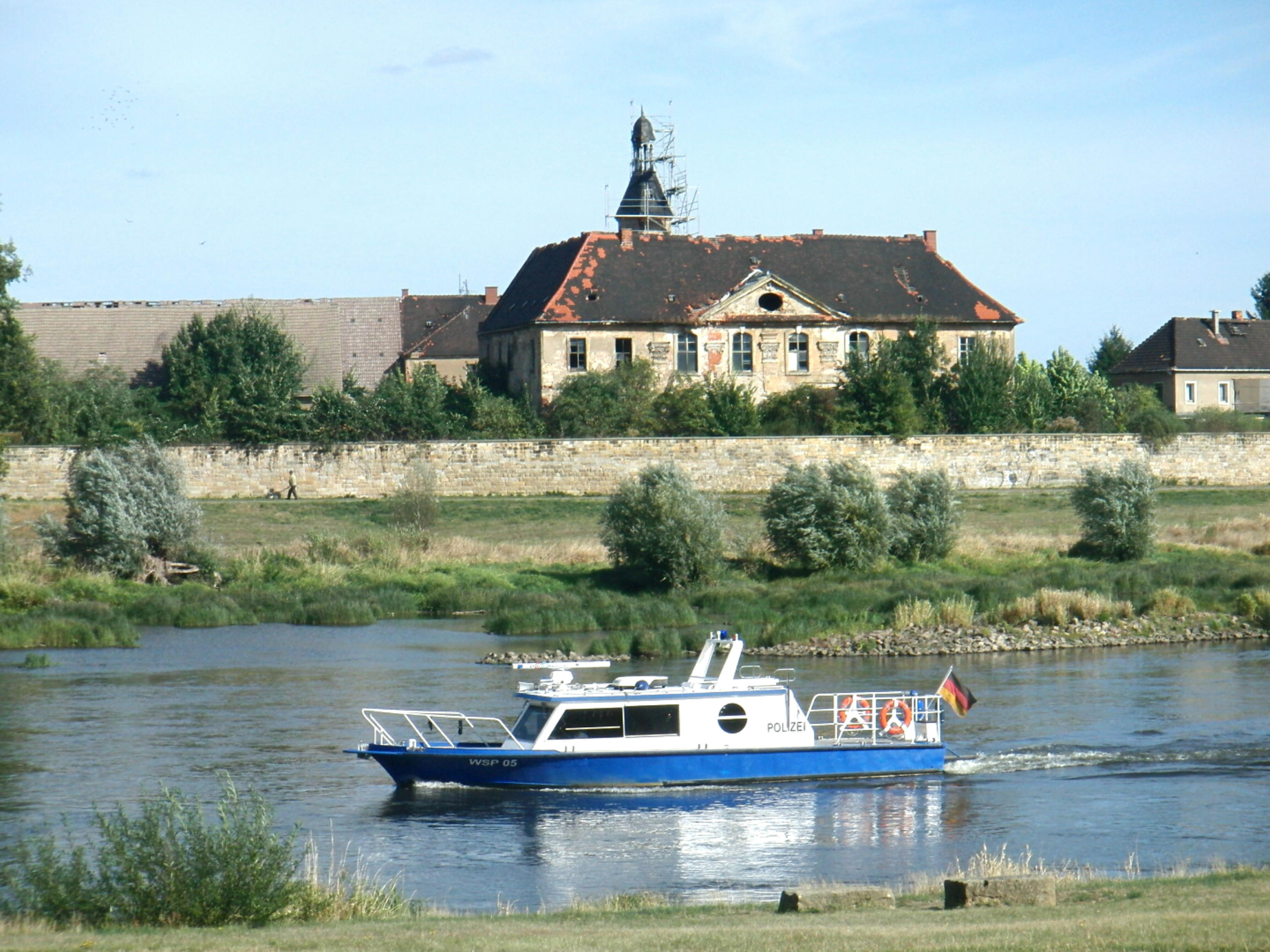 1272 wird ein Herrensitz, später Rittergut. Das heutige dreiflügelige Schloss entstand 1604 auf einem älteren Vorgängerbau.